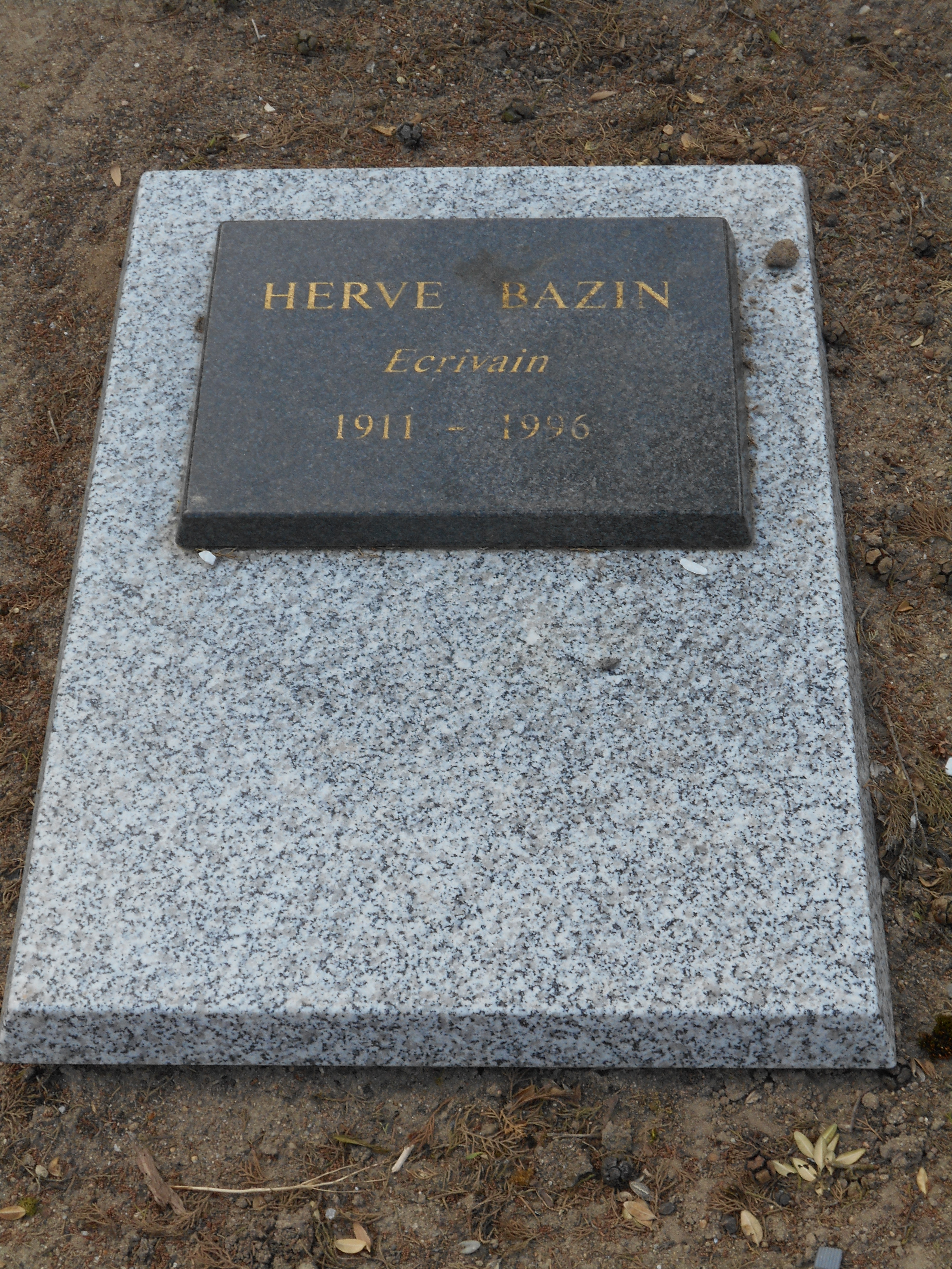 Stèle située dans le cimetière de Cunault dans le Maine-et-Loire, village où vécut l'écrivain Hervé Bazin.